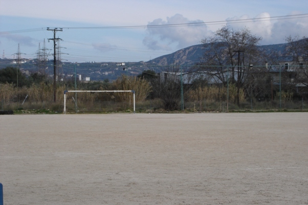 Lefkas groud Patra Greece Γήπεδο Λεύκας Πάτρας